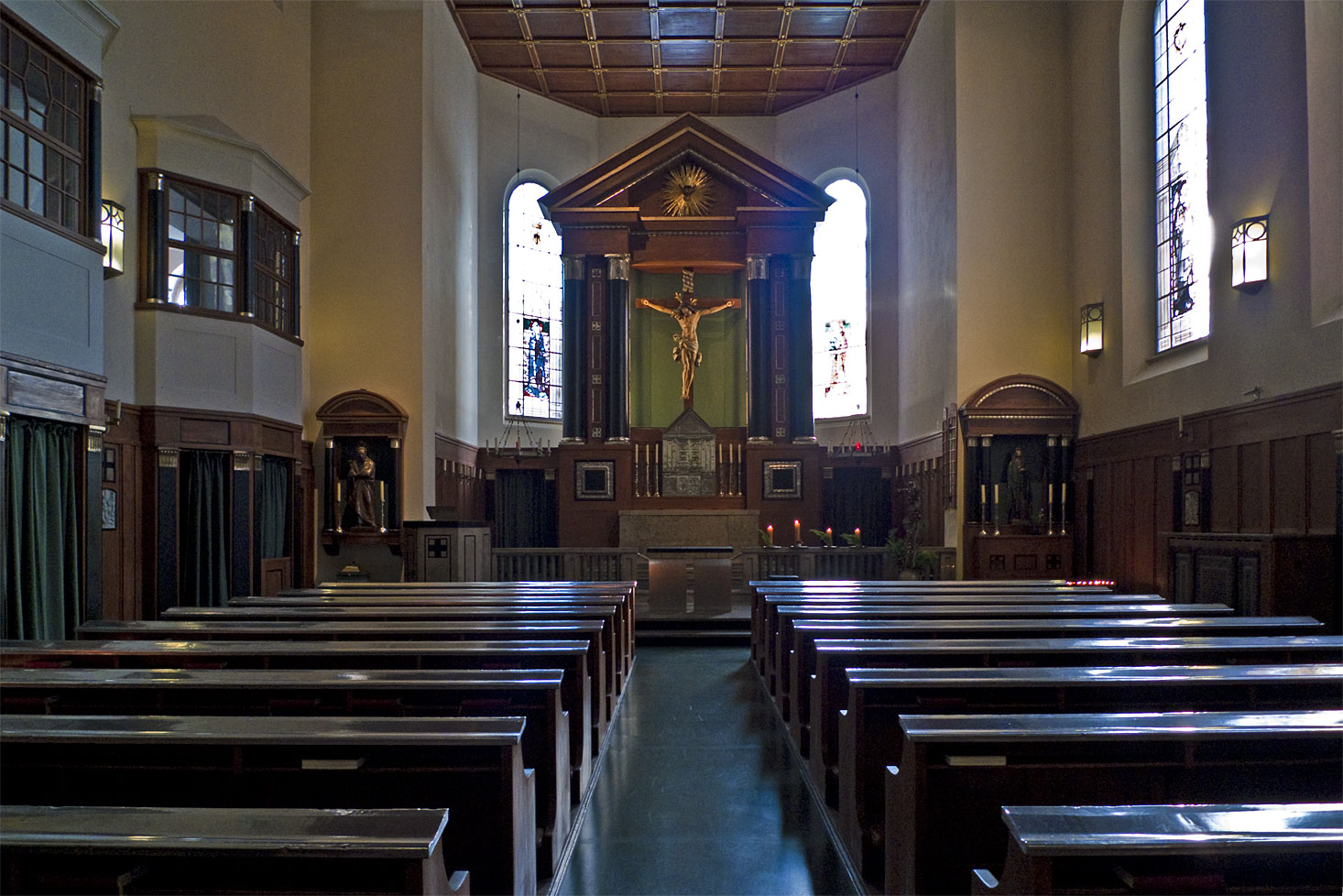 Heilig Kreuz München Klinikum Schwabing Innen